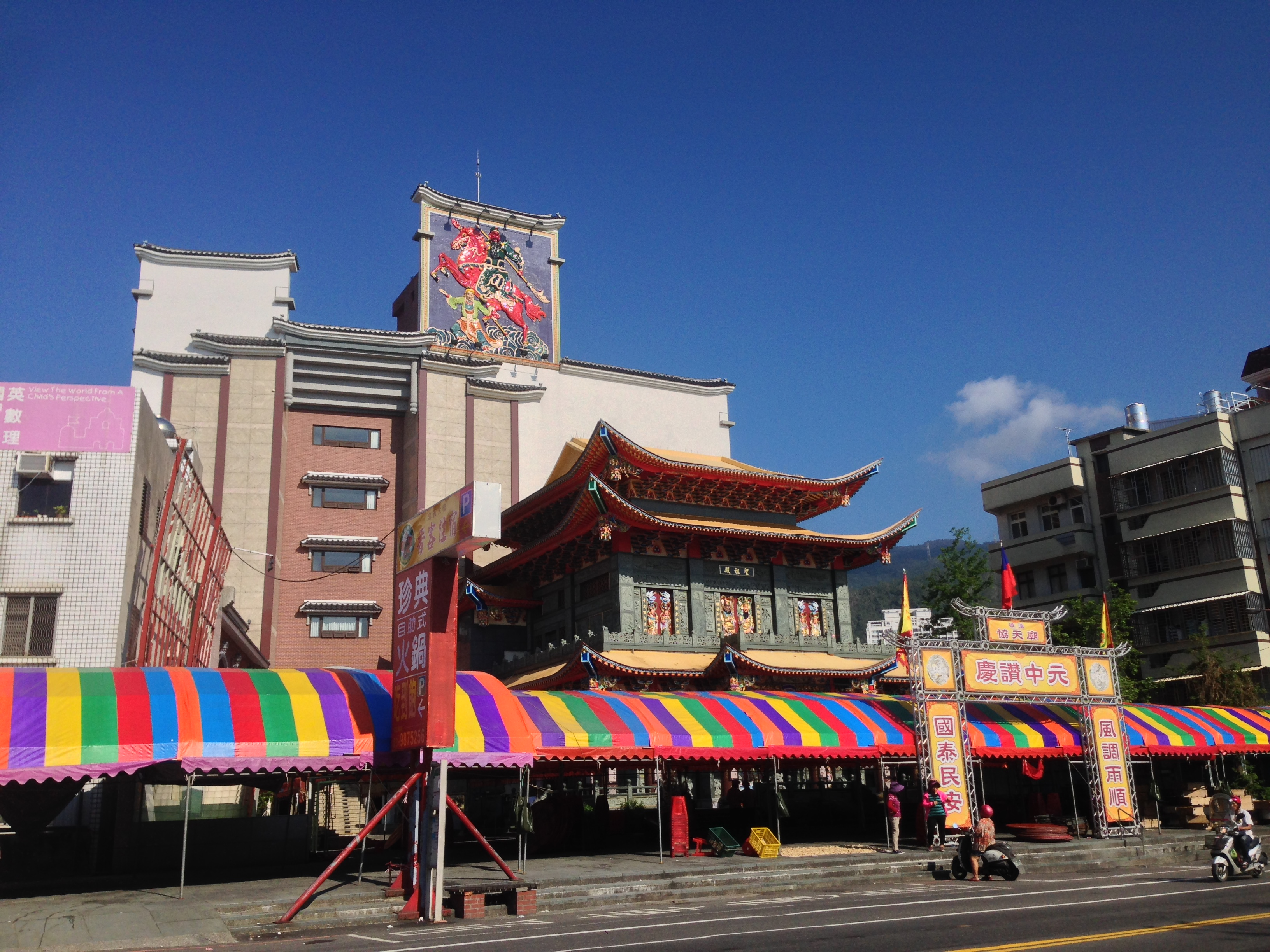 中元普渡的礁溪協天廟聖祖殿。